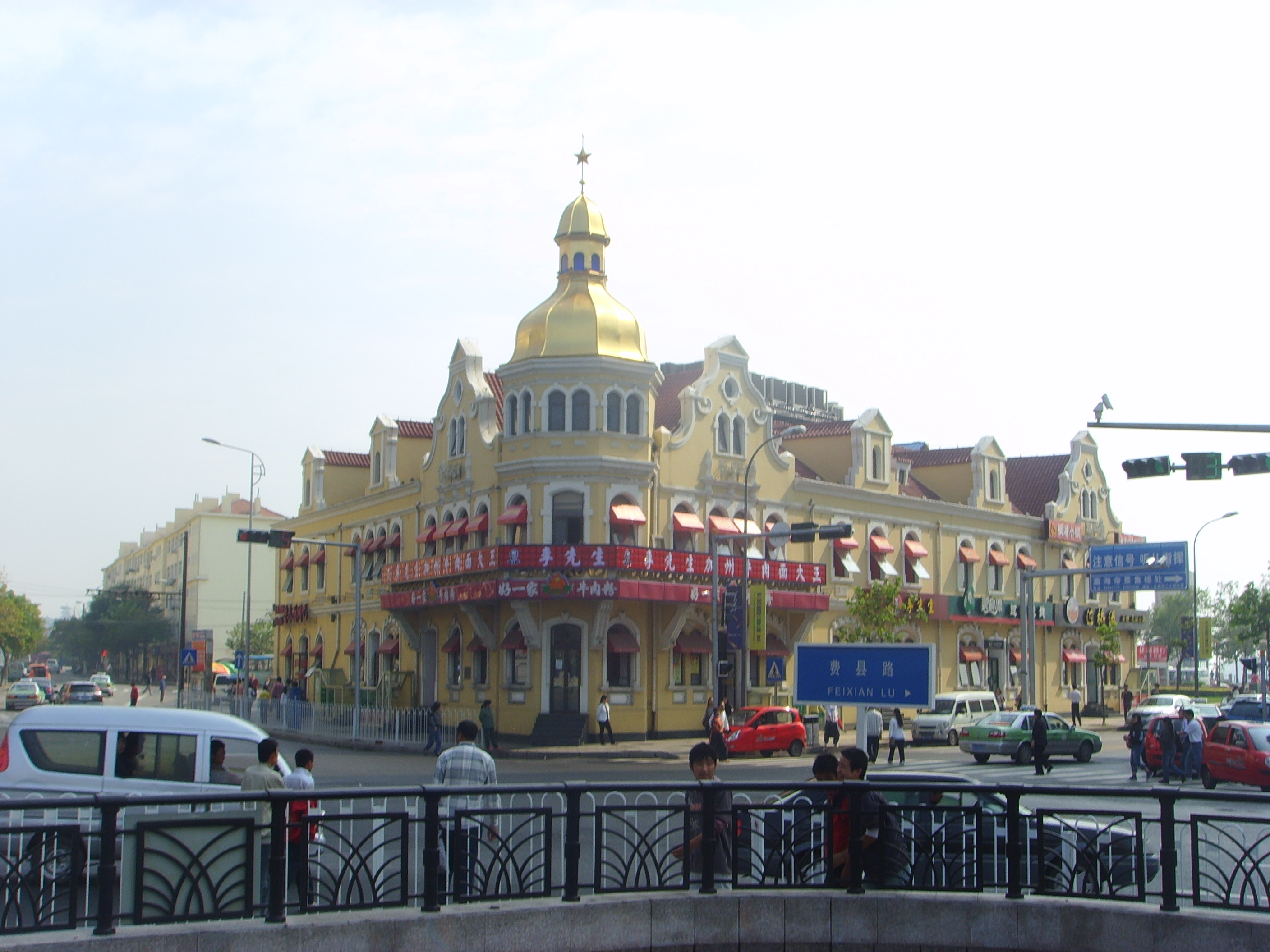 青岛英式建筑